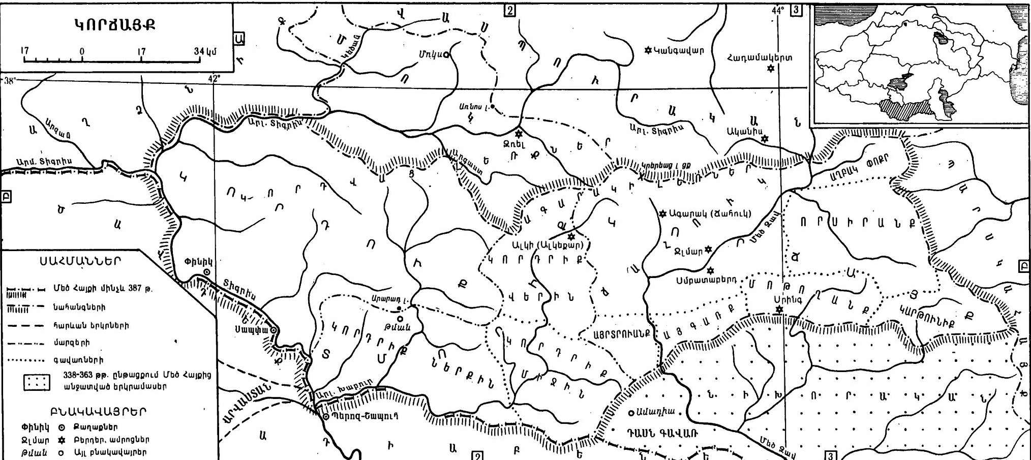 Կորճայք նահանգ